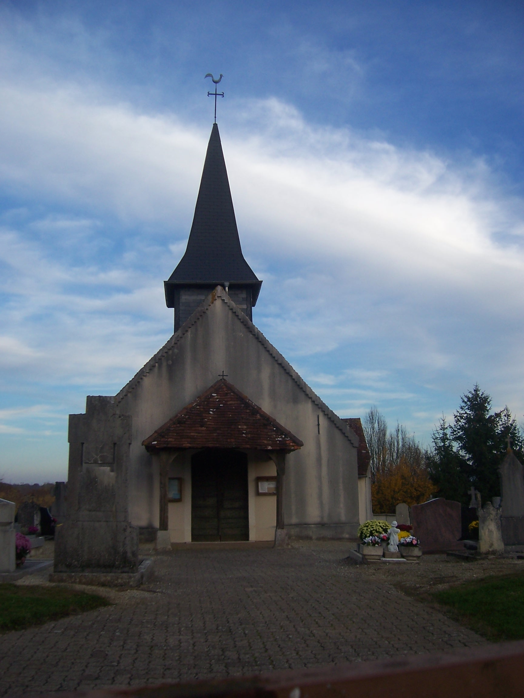 Eglise de Saint-Martin-du-Mont